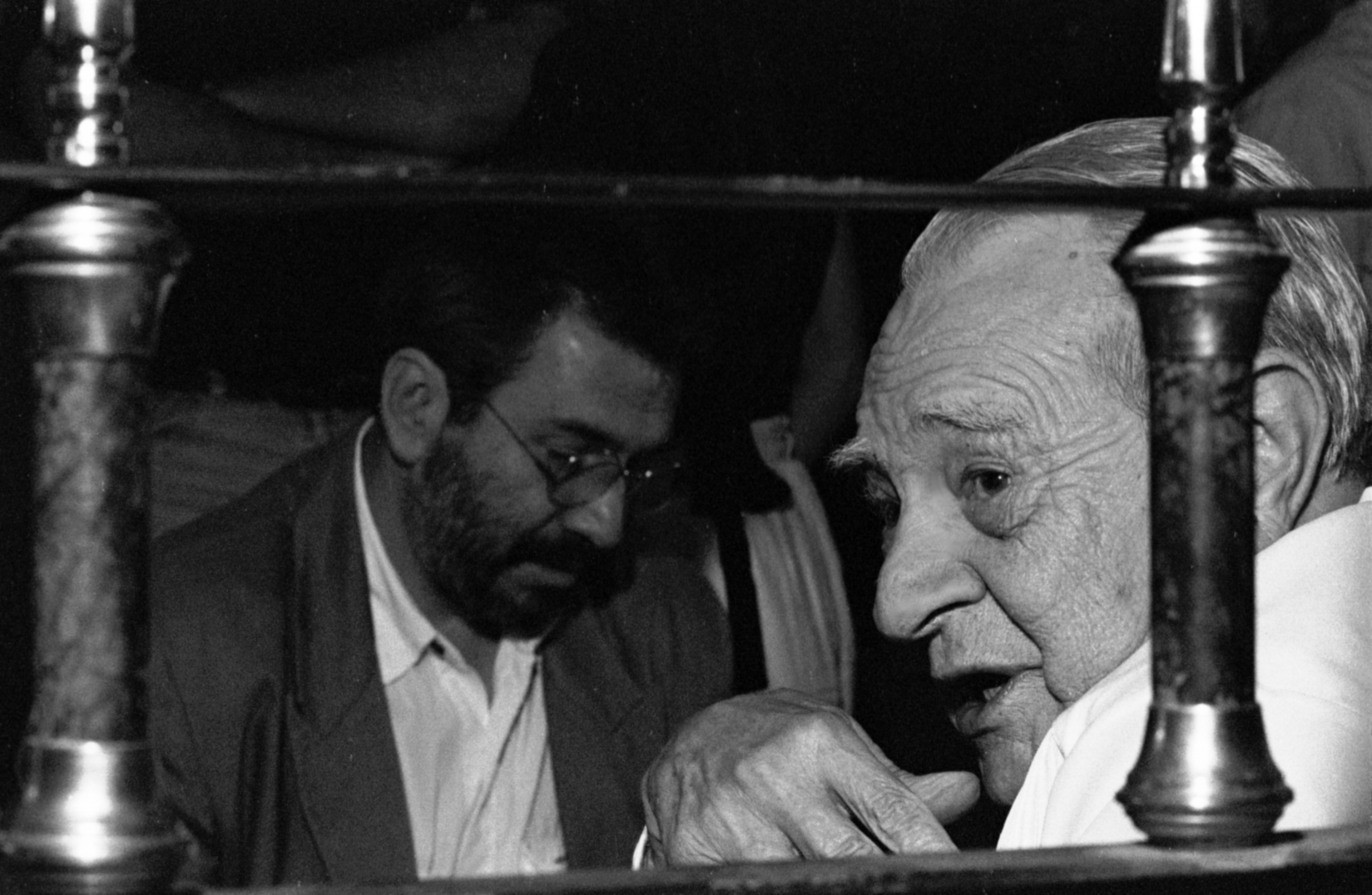 Ismael Rodríguez 01